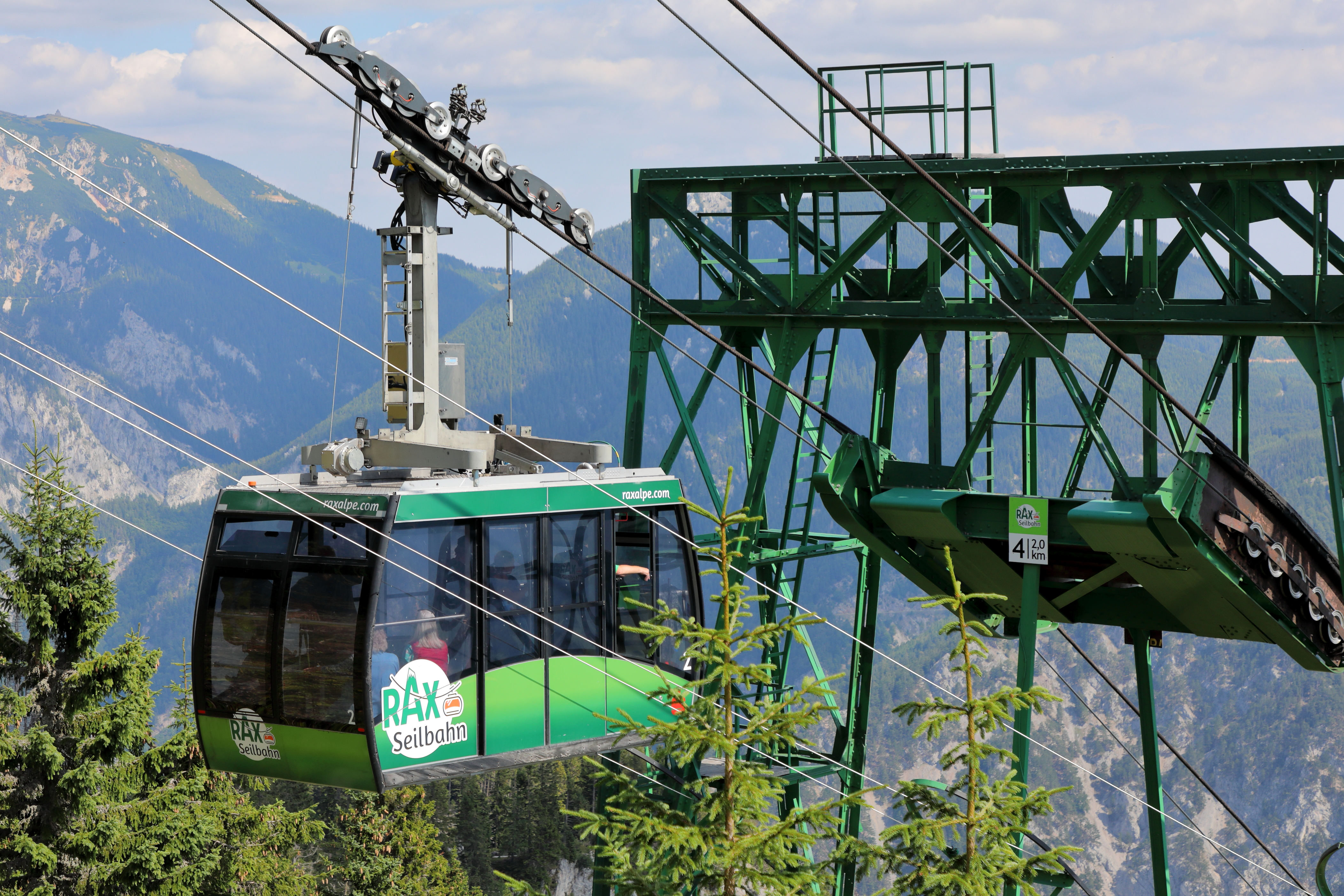 Kabine und Stütze Nr. 4 der in den 1920er Jahren errichteten Rax-Seilbahn in der niederösterreichischen Marktgemeinde Reichenau an der Rax und im Hintergrund das Schneebergmassiv mit der Kaiserin-Elisabeth-Gedächtniskirche.Die älteste Personen-Seilschwebebahn der Republik Österreich hat 5 Stützen, wobei die Stützen vor den Stationen wegen der vergleichsweise geringen Spurweite als Portalstützen ausgeführt sind. Neben den Stationsgebäuden sind die Stützen die einzigen Teile, die noch original erhalten sind. Die aktuell (2019) eingesetzten Kabinen (4. Generation) wurden 2002 von der Firma Carvatech gefertigt und 2015/16 generalsaniert.